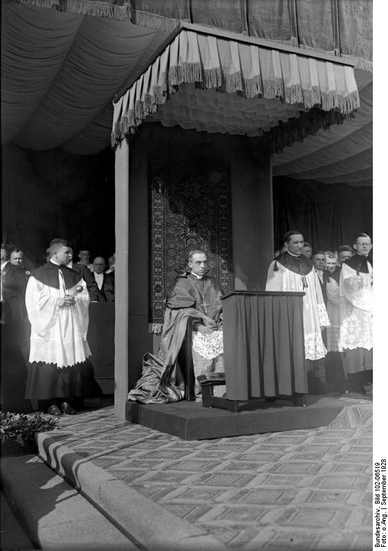 Der große Katholikentag in Magdeburg! Der päpstliche Nuntius Kardinal Pacelli zelibrierte selbst die heilige Pontifikalmesse. Der päpstliche Nuntius Kardinal Pacelli unter dem heiligen Badachin, zelibriert die heilige Pontifikalmesse auf dem Ehrenhof der Stadthalle in Magdeburg.